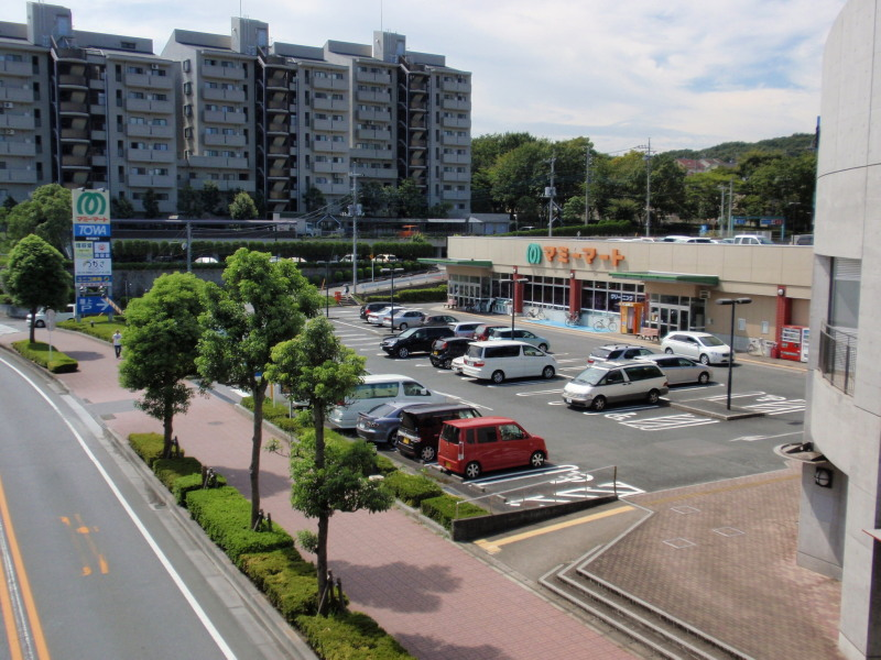 マミーマート松風台店（高坂丘陵ショッピングプラザ） 埼玉県東松山市松風台9-1